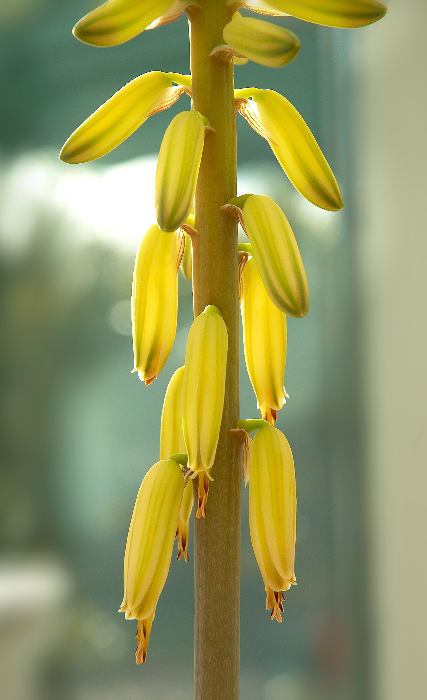 Aloe vera (in house, Belgium)